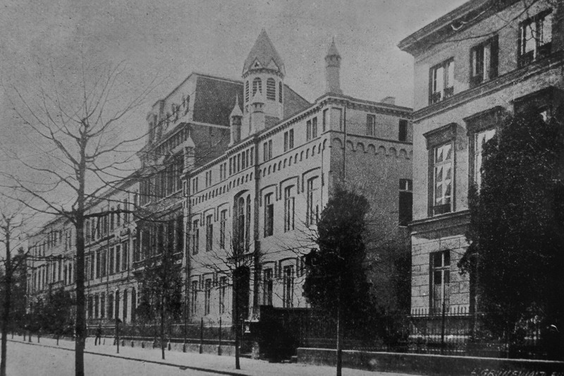 Das "alte" Johanneum in Bonn Quelle: Archiv des Johanneums